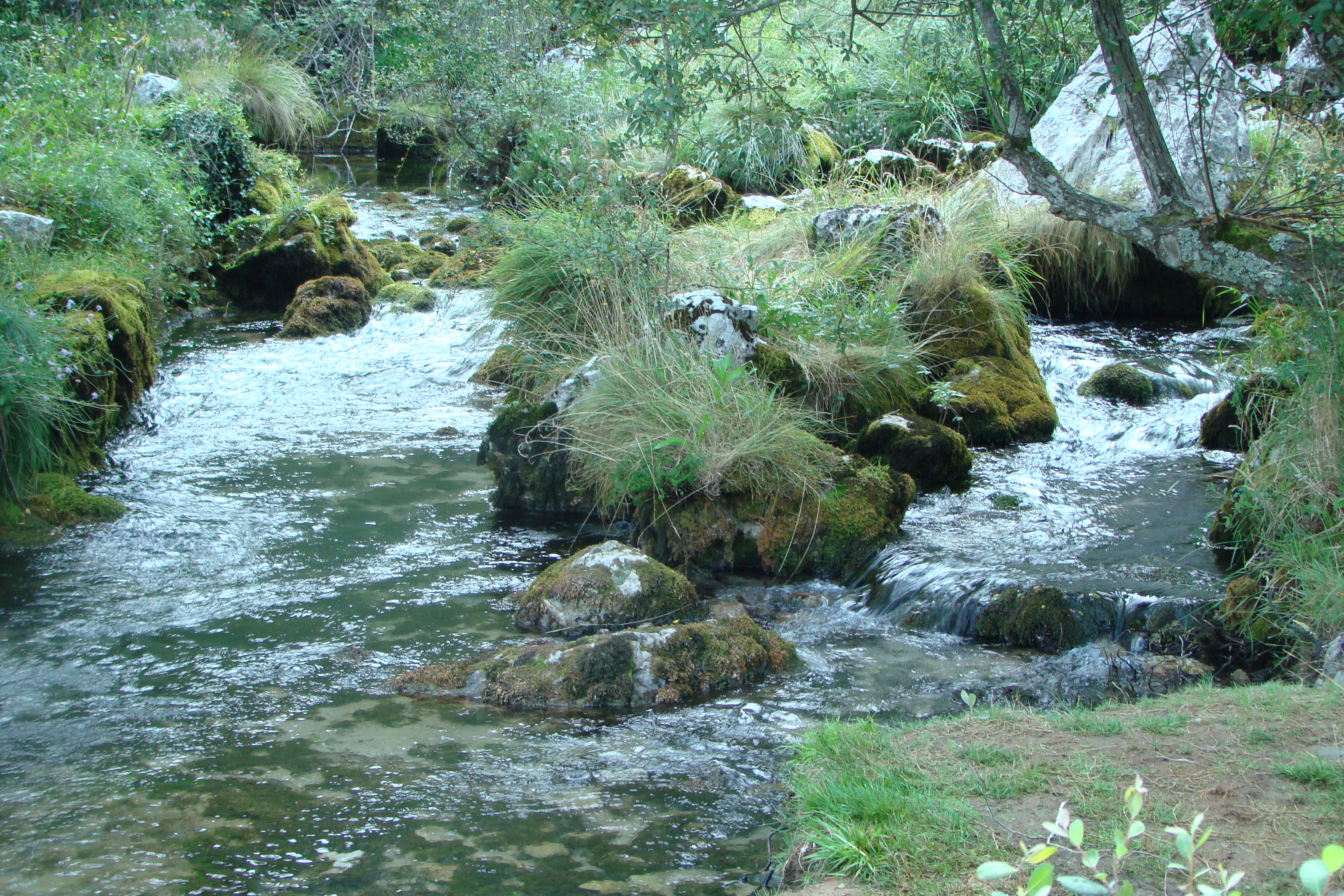 Nacimiento del Río Gándara (Valle de Soba, Cantabria)